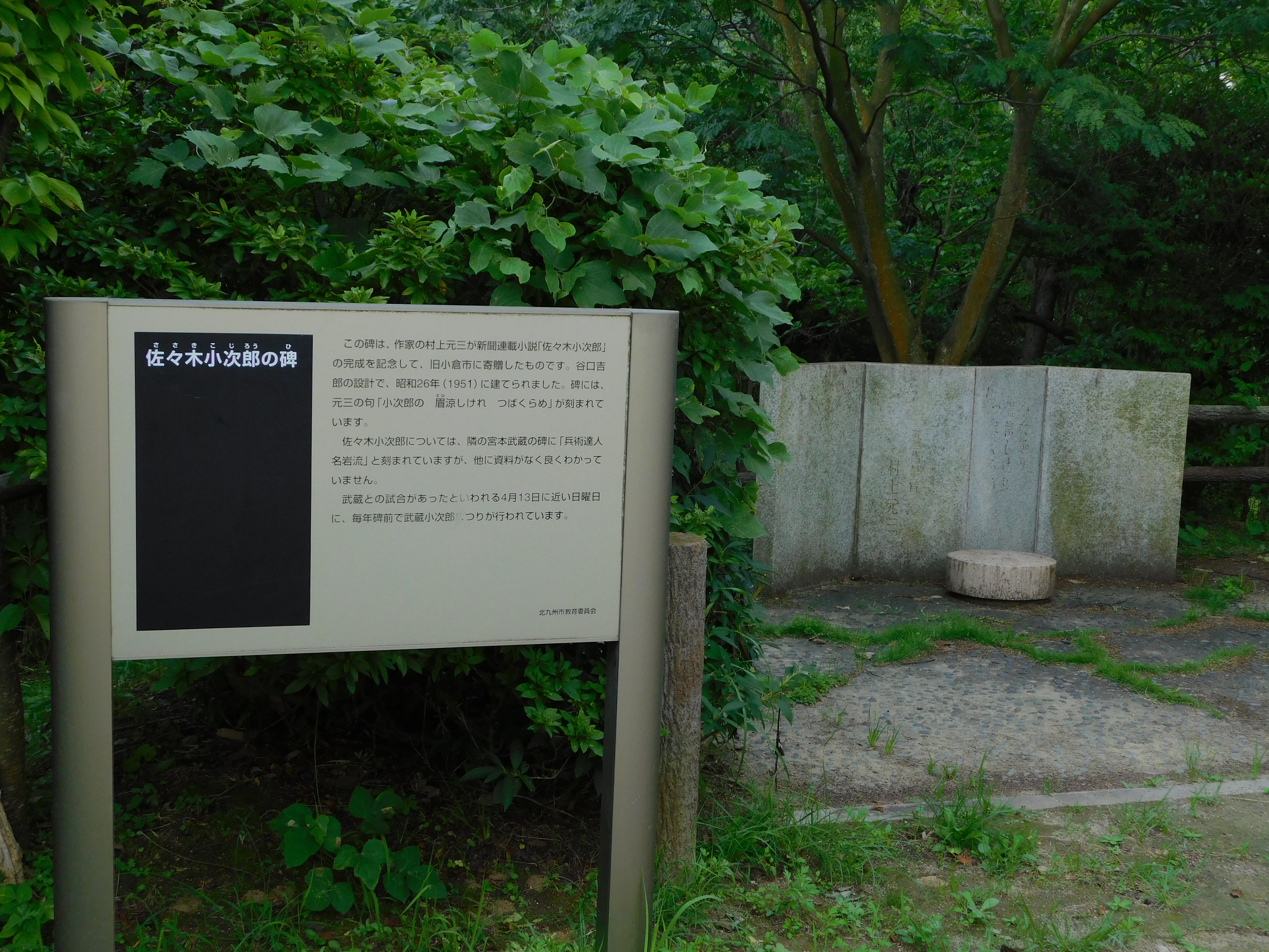 2019年7月24日撮影